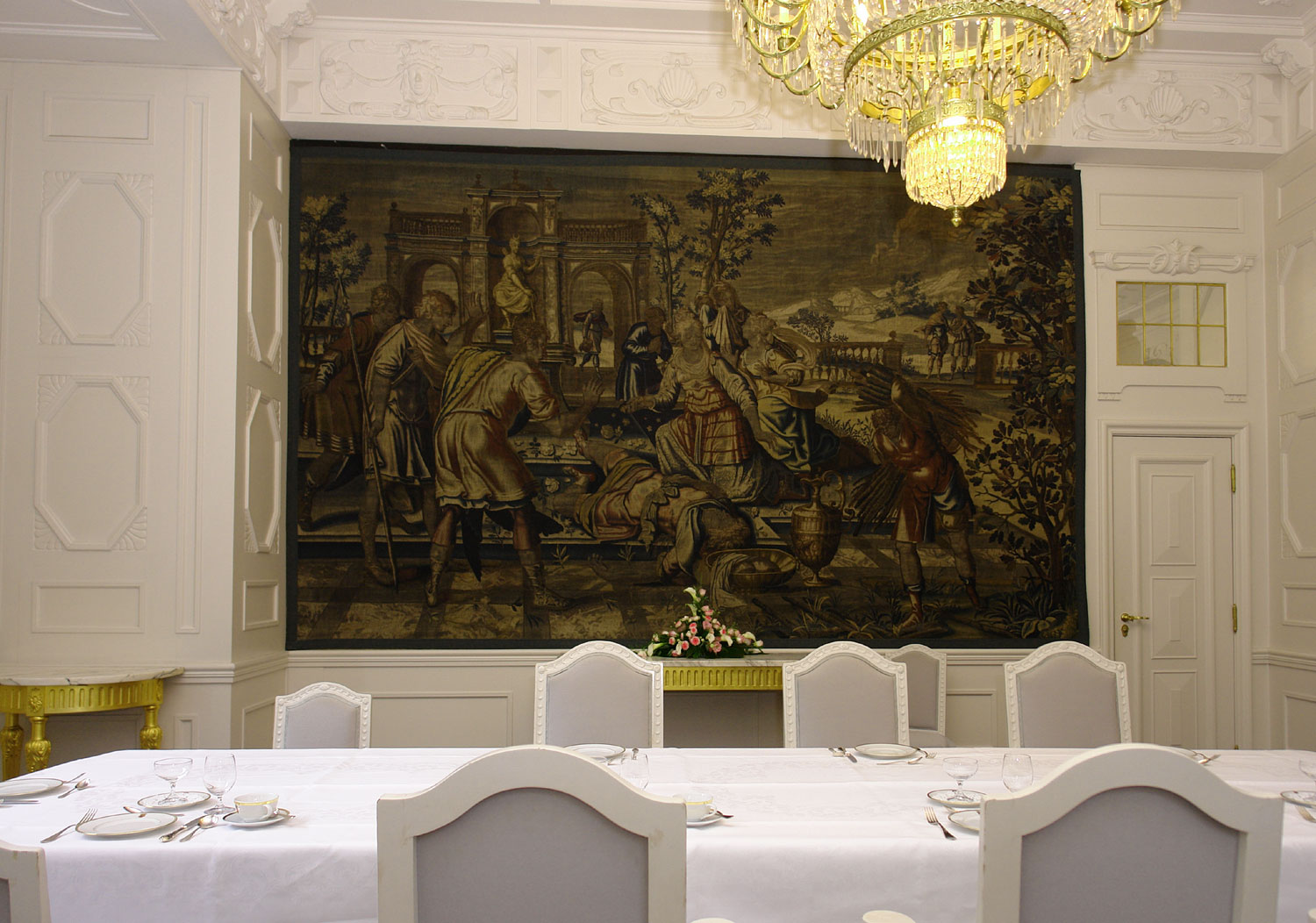 Rathaus in Bremen. Französischer Gobelin aus der ersten Hälfte des 17. Jh im Gobelinzimmer (der Tod Otos).